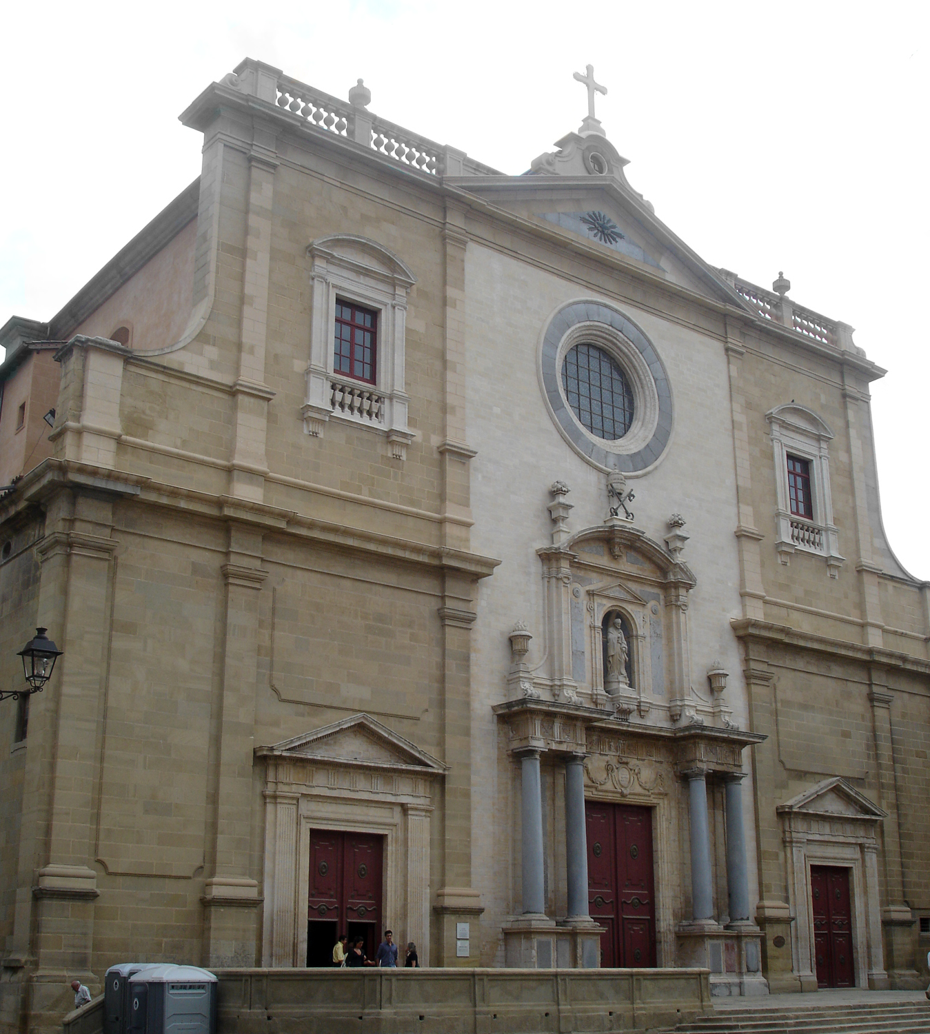 Catedral de Sant Pere de Vic (Vic, Osona, Catalunya, Espanya)